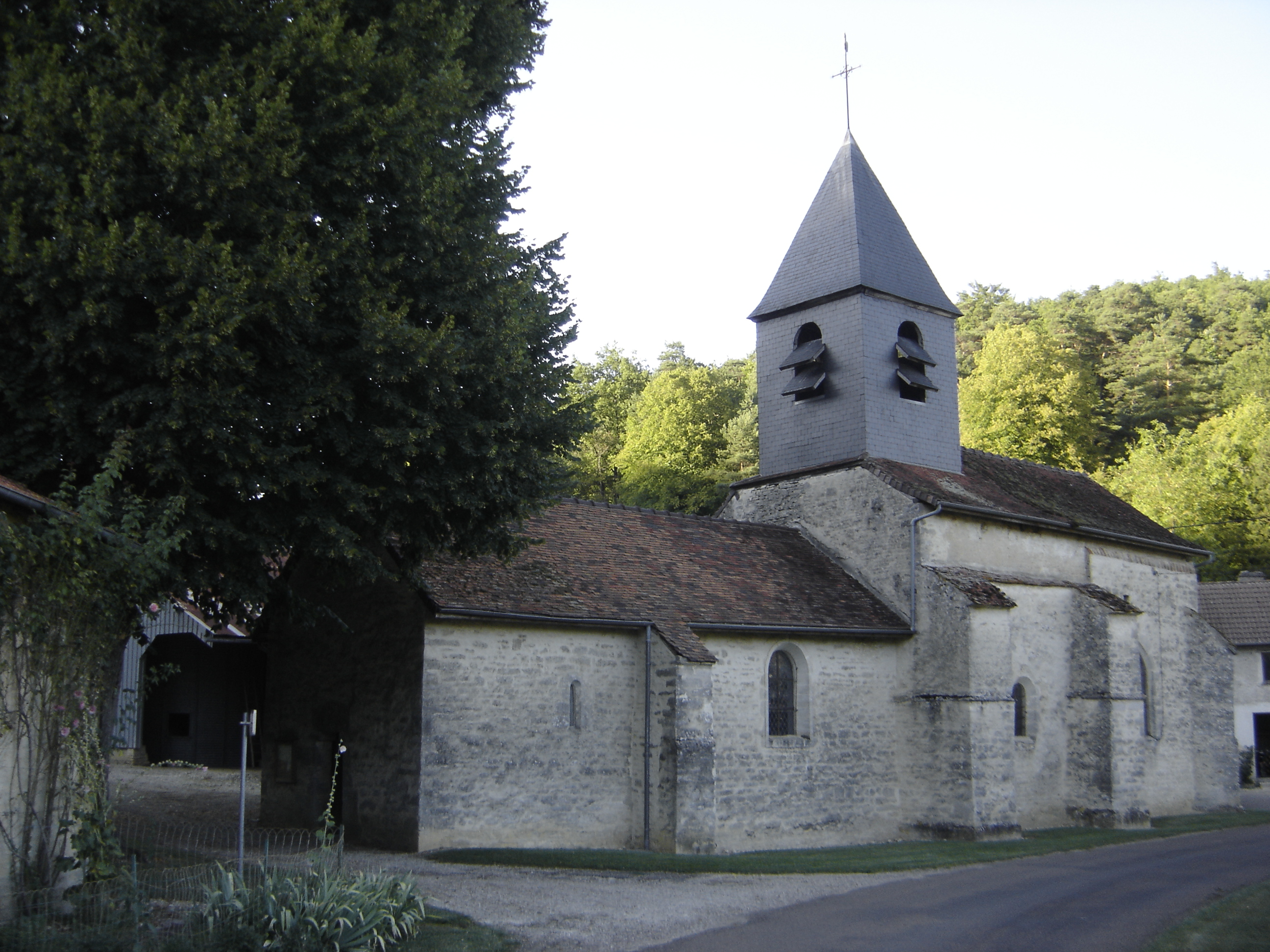 église Saint-Laurent de Fravaux - Aube - France